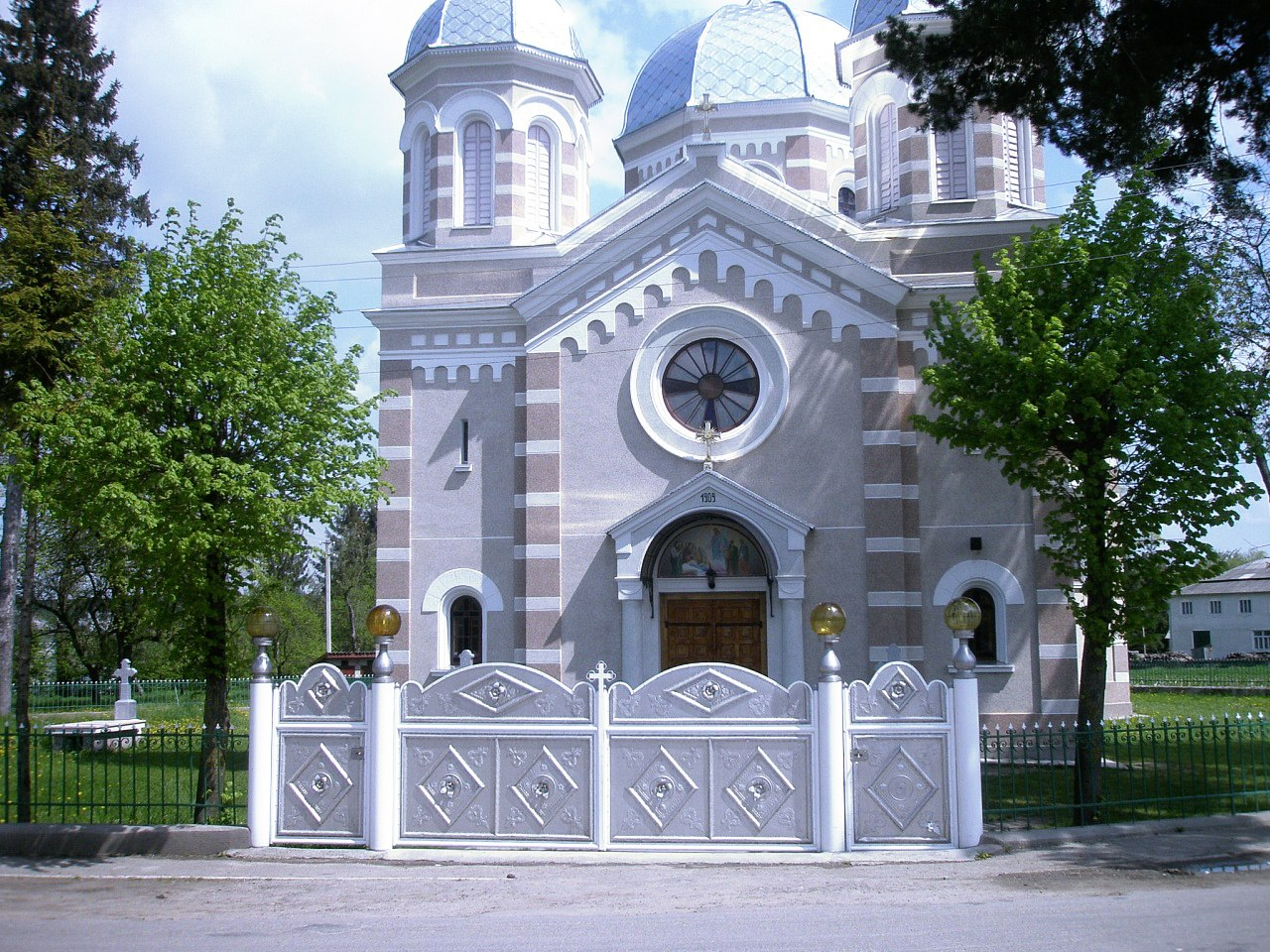 Церковь Успения Святой Богородицы начало 2000-х